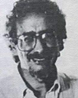 Néstor Vicente, candidato de Izquierda Unida a la presidencia de la Nación Argentina, 1989.